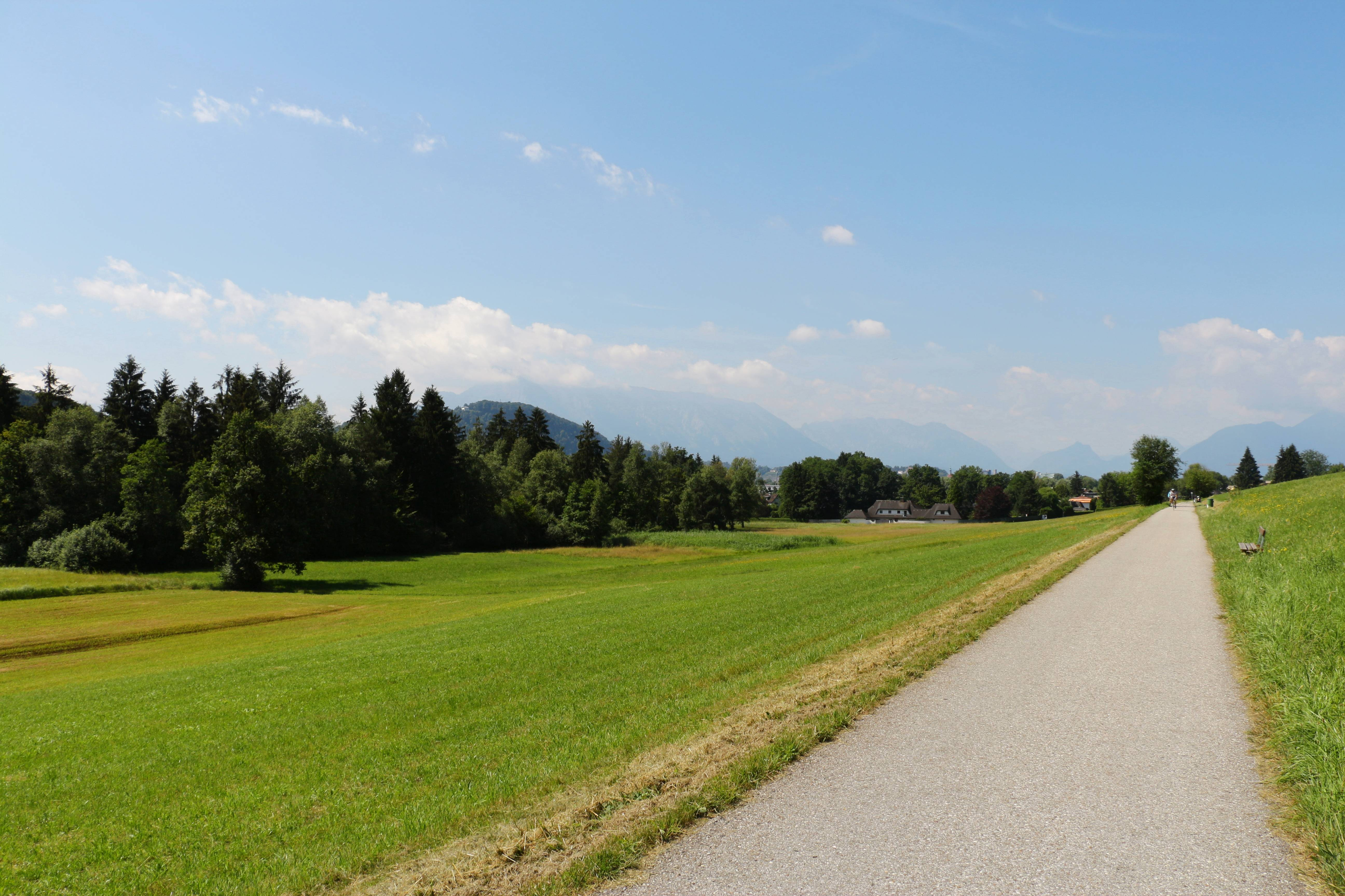 Die Trasse der ehemaligen Salzkammergut-Lokalbahn, der sogenannten Ischlerbahn, im Salzburger Stadtteil Langwied. Die Strecke wird heute als Fuß- und Radweg genutzt und ist Teil des Mozart-Radwegs. Links: Teil des Moorwäldchens in Sam, einem Naturdenkmal innerhalb des geschützten Landschaftsteils Samer Mösl.